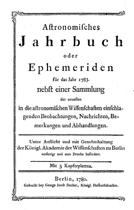 Berliner Ephemeriden 1783